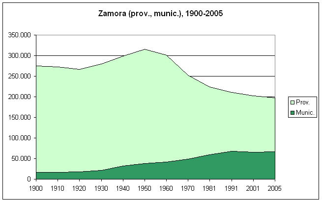 Population from the municipality (dark green) and province (pale green) of Zamora, in Spain, 1900-2005. Own work, according to data from the Instituto Nacional de Estadística. // Población del municipio de Zamora (verde oscuro) y la provincia homónima (verde claro), en España, 1900-2005. Datos decenales, según el INE. Se observa el decrecimiento general de la provincia desde mediados de siglo, paralelo a un incremento de la capital regular hasta 1991.